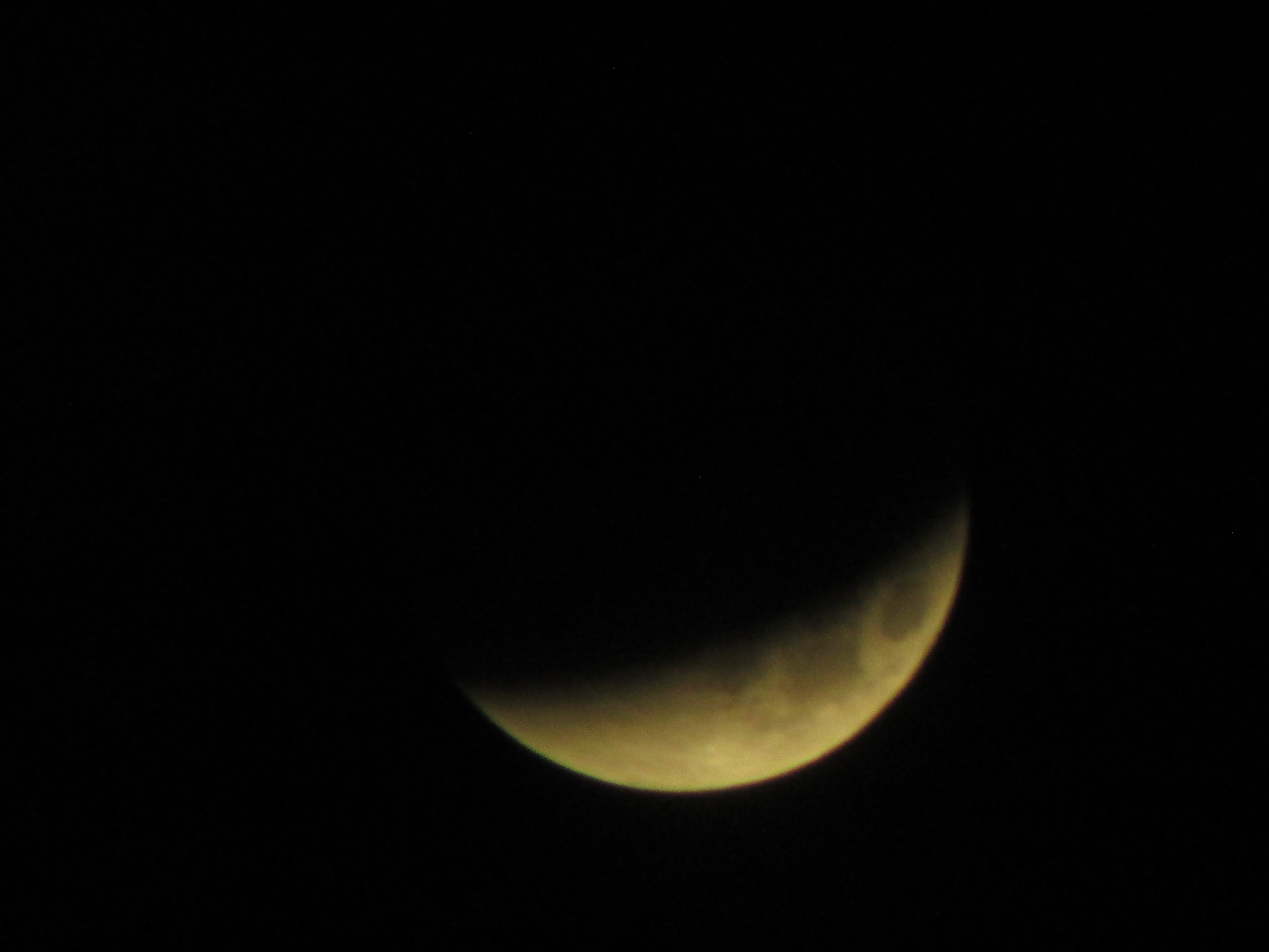 Photographie de l'éclipse totale de Lune du 28 septembre 2015, prise en Vendée à l'aide d'un APN accouplé à une jumelle.